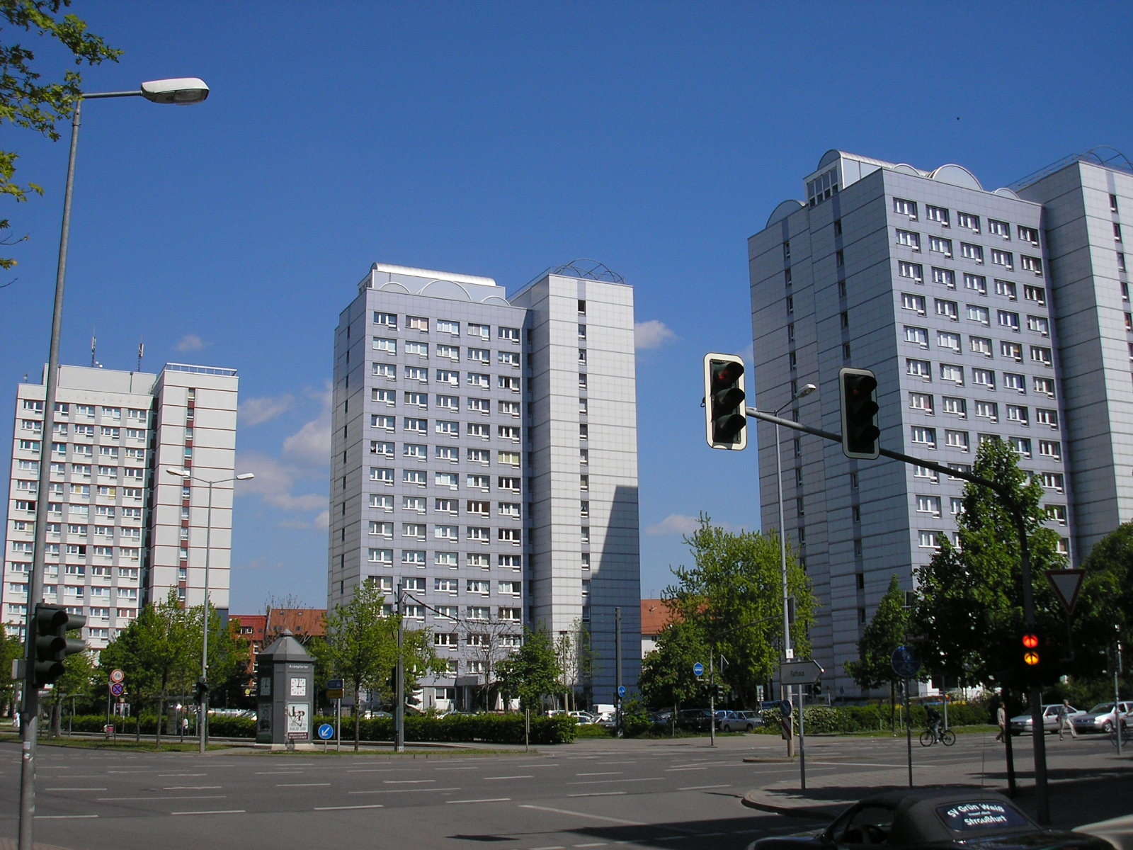 Punkthochhäuser (PH 16) Juri-Gagarin-Ring 126 A, B und C in Erfurt (Thüringen).